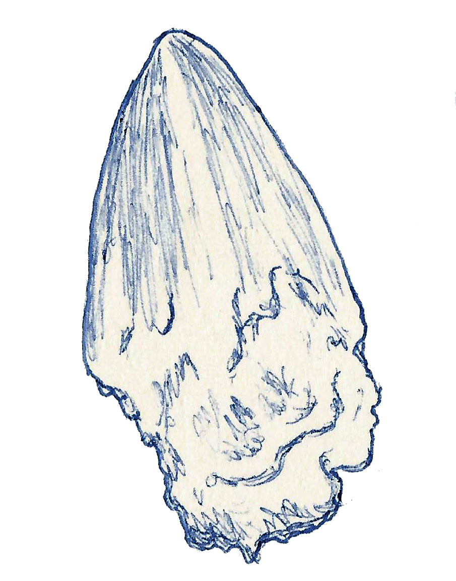 Illustration of a fossil of Diplotomodon